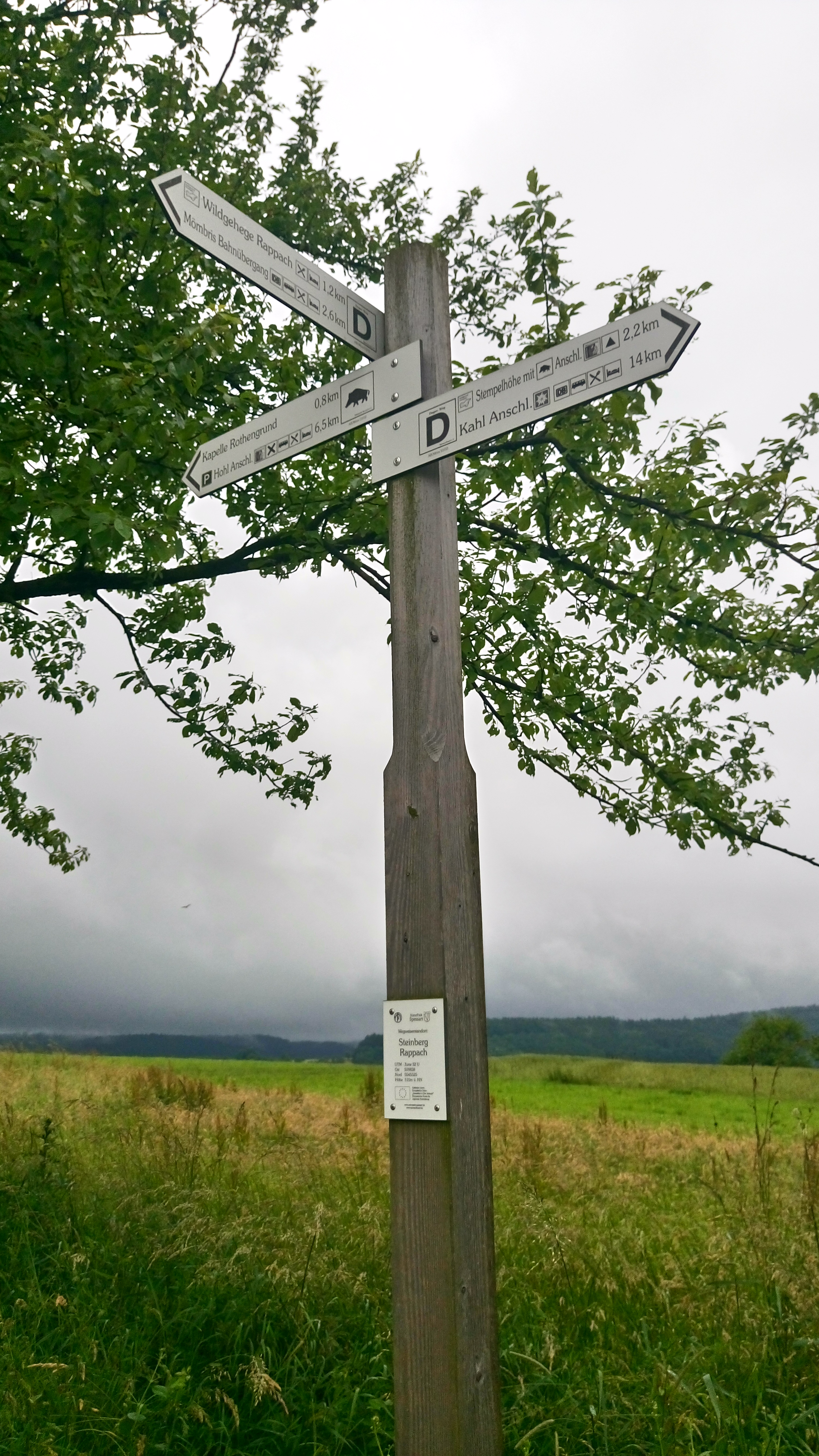 Wegweiser am Degen-Weg bei Rappach